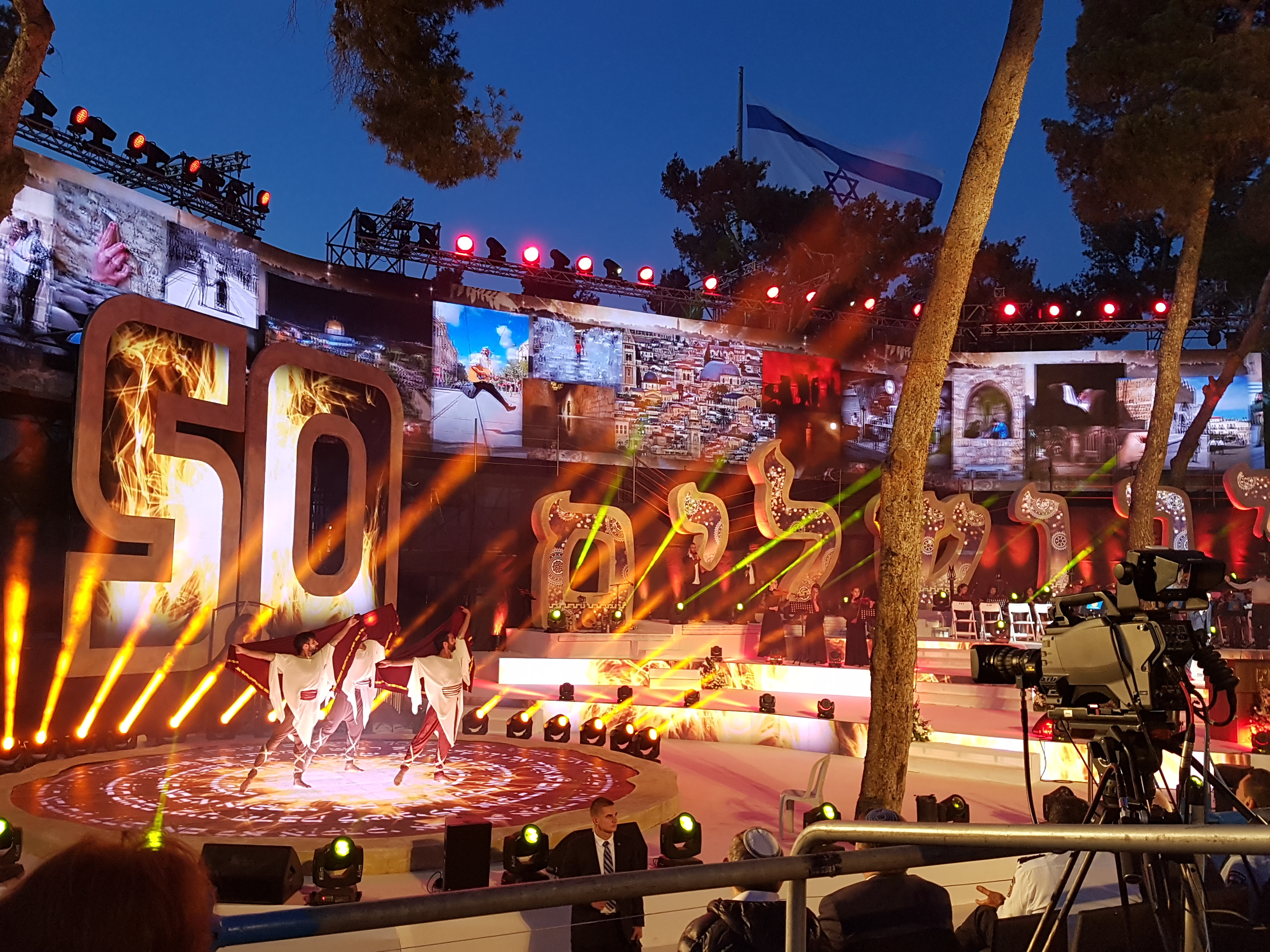 עצרת ממלכתית לציון יובל שנים לשחרורה ואיחודה של ירושלים בגבעת התחמושת